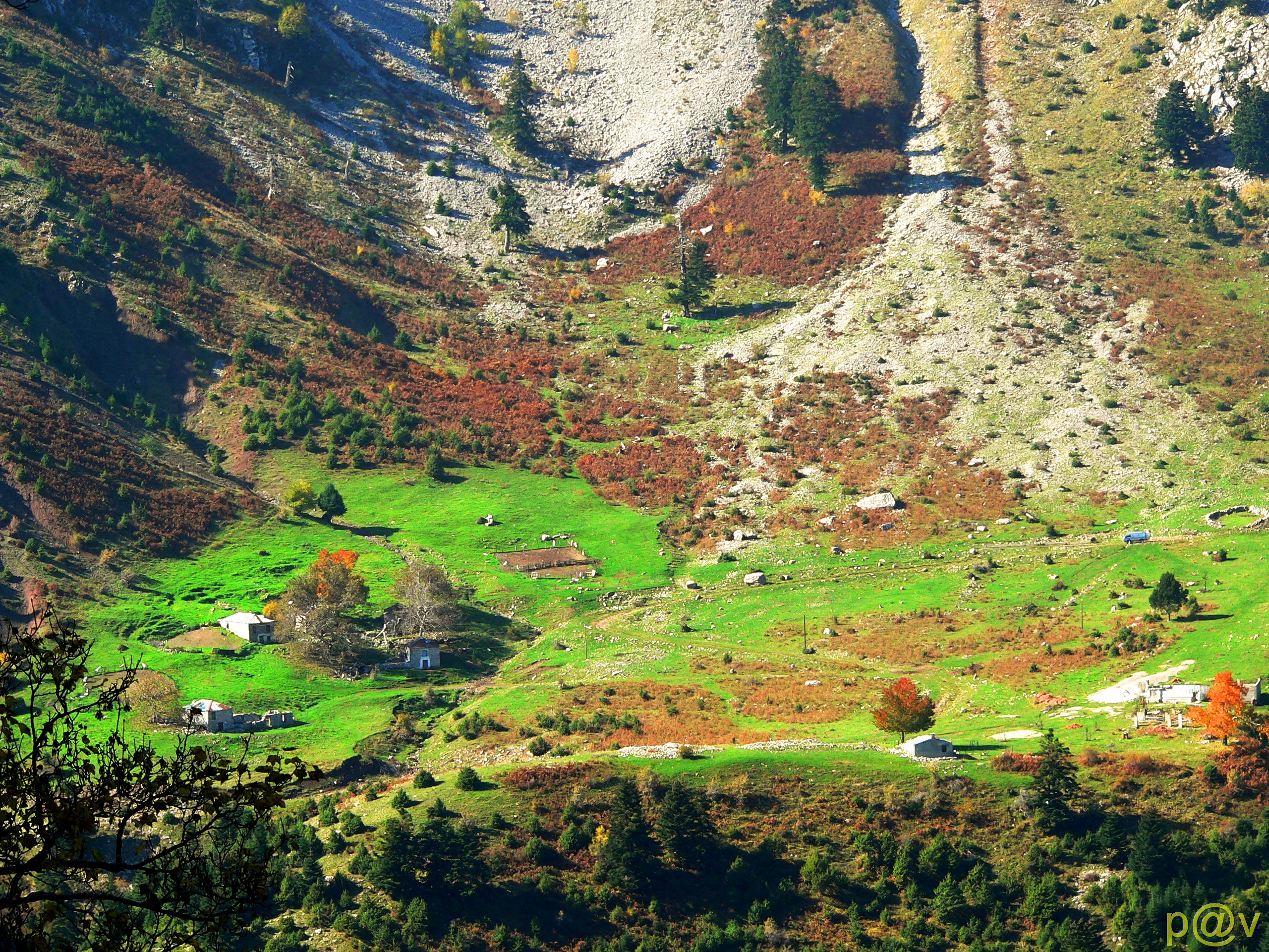 Αλπικο λιβαδι στο δρομο για Βραγγιανα